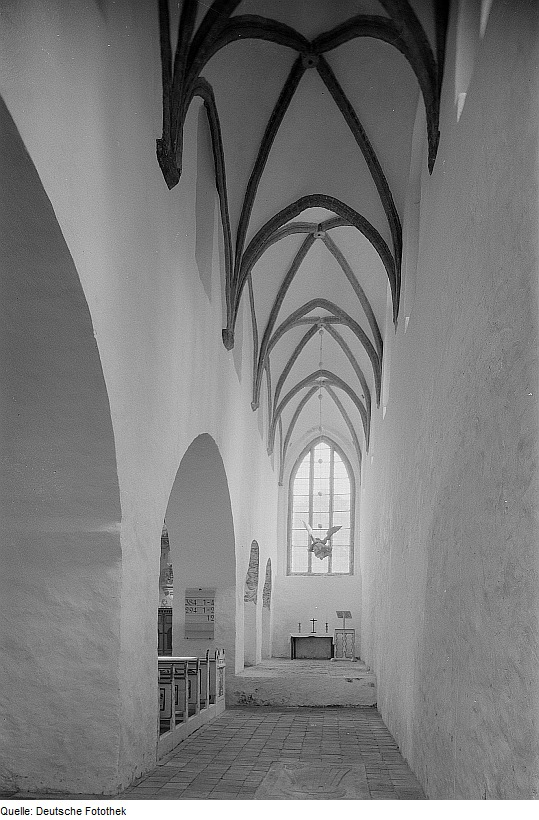 Original image description from the Deutsche Fotothek Krevese. Klosterkirche, Inneres